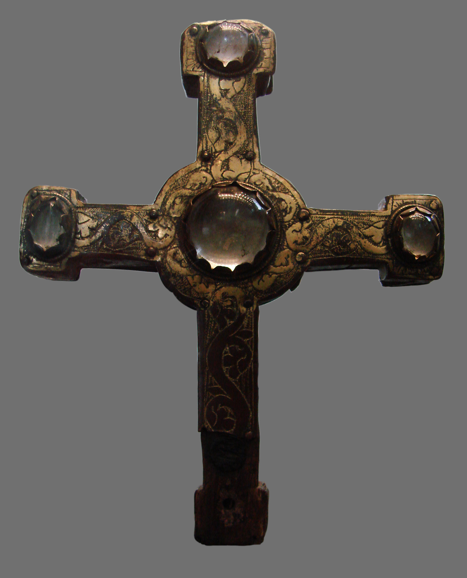 Croix reliquaire, cuivre doré et gravé, première moitié du 13ème siècle. Musée de Picardie à Amiens.